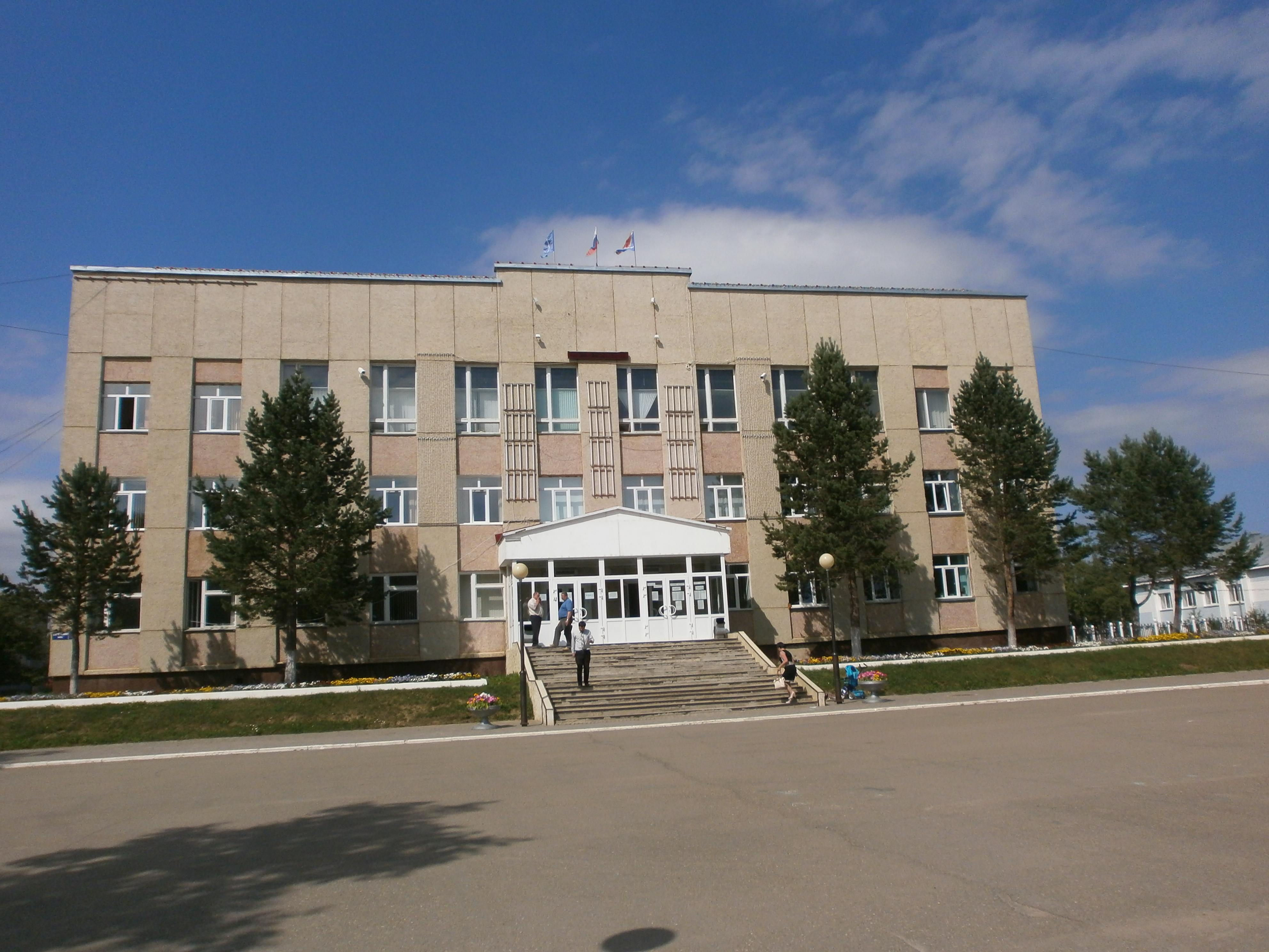 オハ市役所。投稿者本人による撮影。